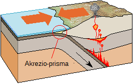 Akrezio-prisma baten irudikapena.